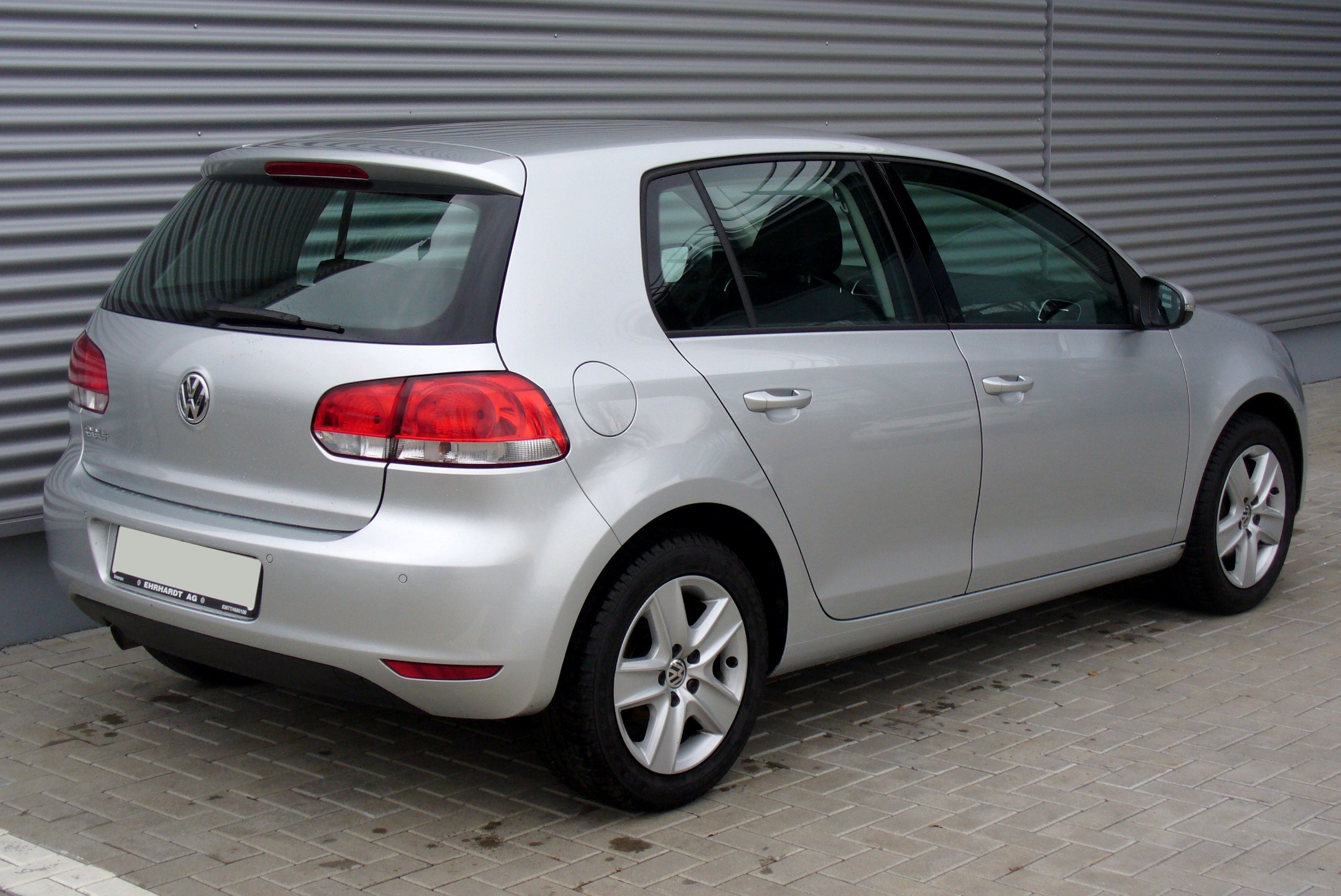 VW Golf VI